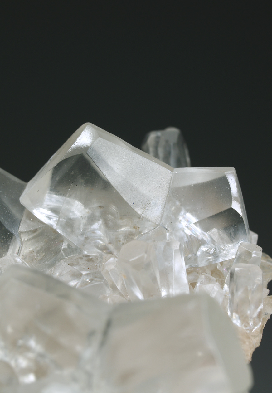 Excelente ejemplo de calcita maclada (macla de la mariposa). Buena transparencia y dispuestas de forma aérea sobre la matriz. Este ejemplar procede de los yacimientos de calcita óptica de José M. Patoni, explotaciones conocidas mundialmente por la pureza, transparencia y complejidad cristalográfica de sus cristales de calcita. Medidas: 4,0 x 3,3 x 1,6 cm. Cristal principal: 23 x 14 mm. Encontrado en 2004. Localidad: José María Patoni (Menores de Arriba), San Juan del Río, Durango, México Fluorescente bajo UV onda larga